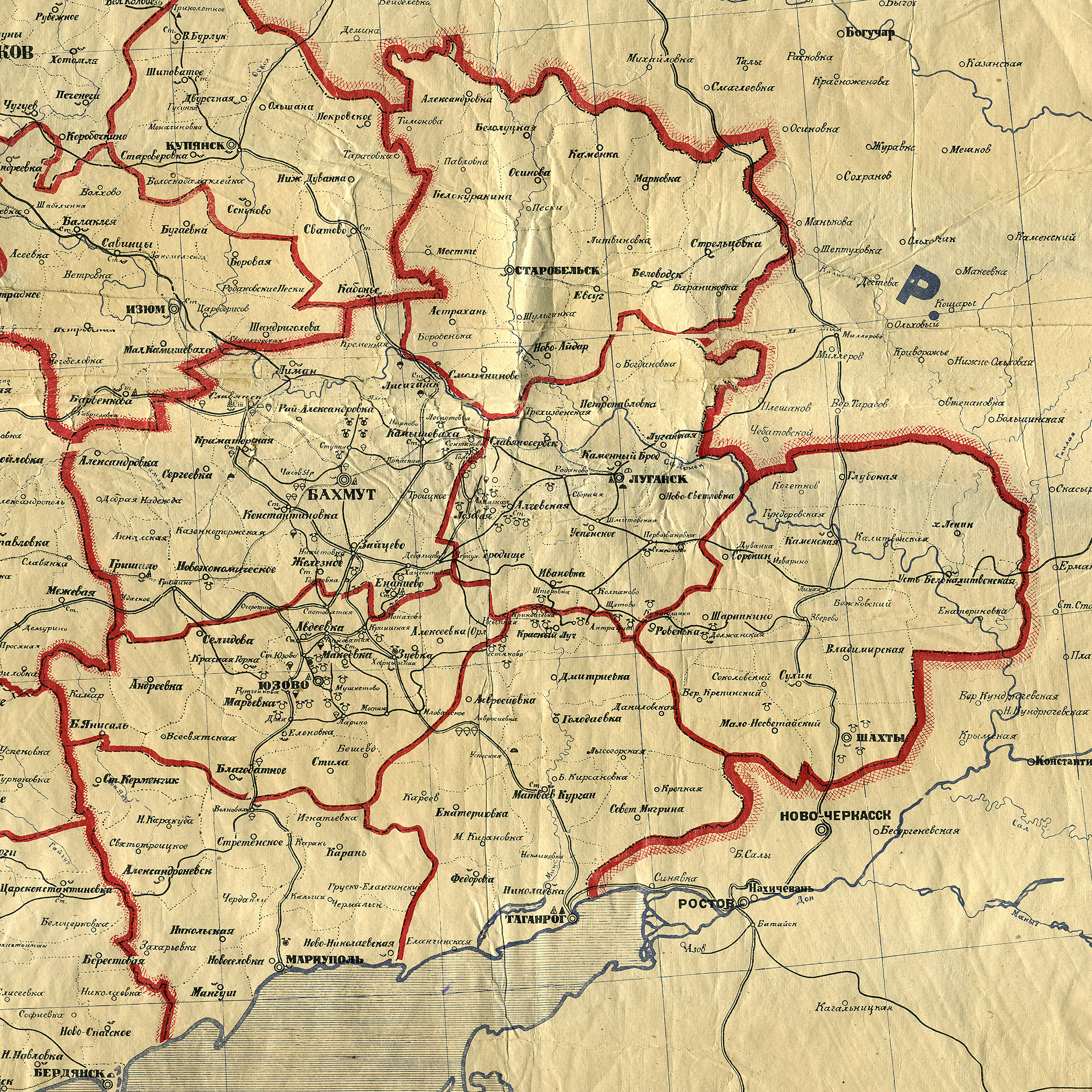 Донецька губернія, фрагмент мапи Української соц. рад. республіки, адміністративний поділ після 12 квітня 1923 року